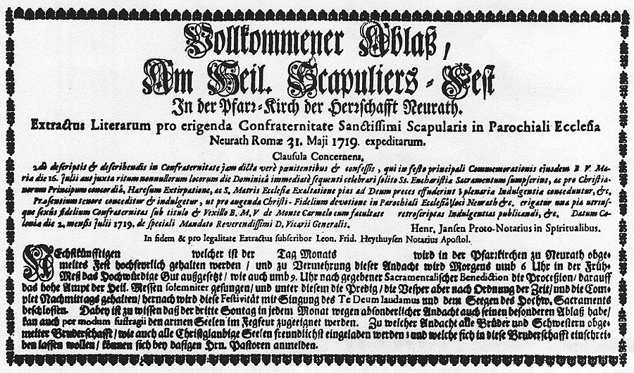 Ablass-Zettel zum Heil. Scapulier-Fest in der Pfarr-Kirche der Herrschaft Neurath